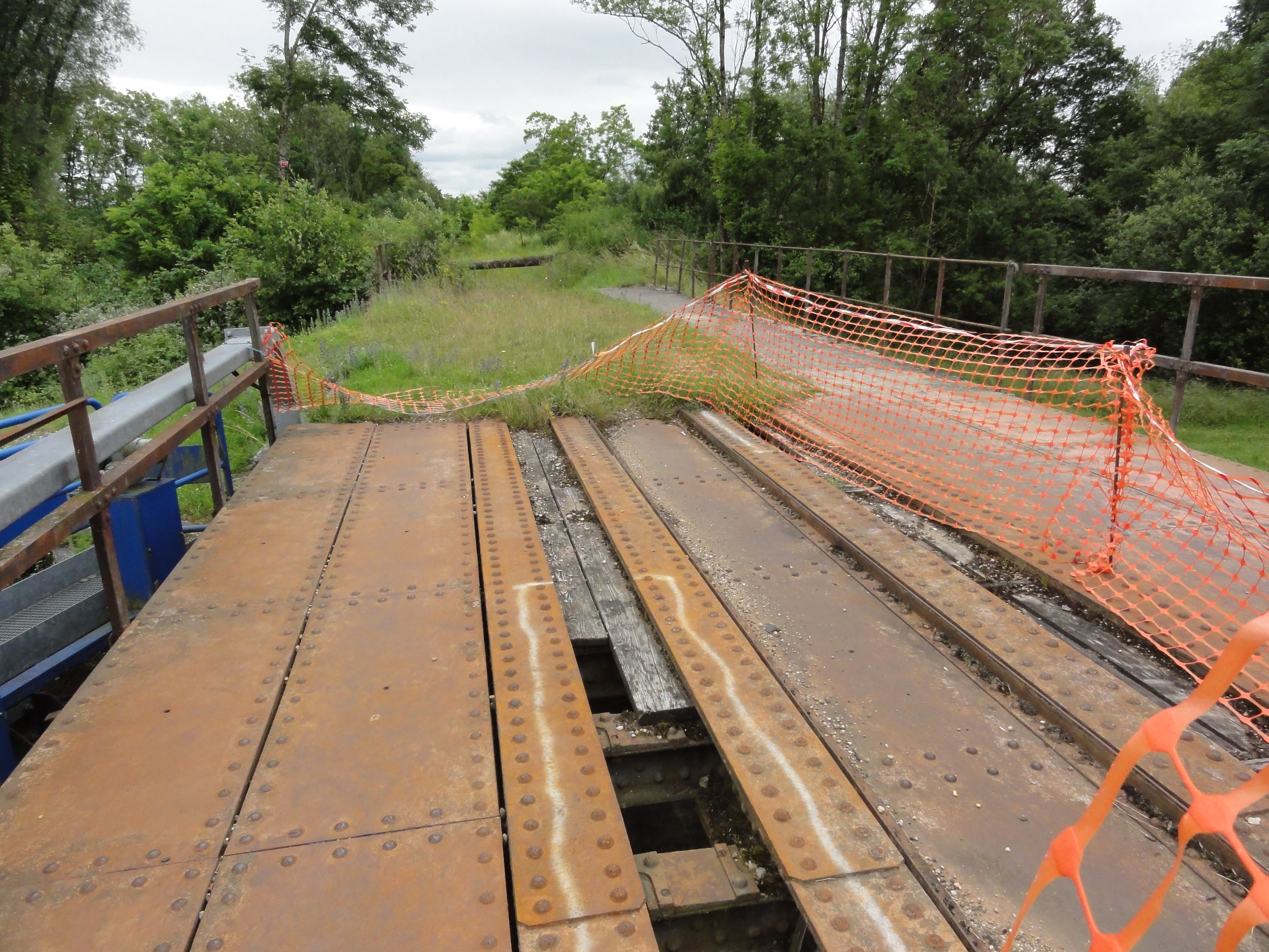 Bataville (Moselle) ancien CdeF avec pont sur canal de la Marne au Rhin (01).JPG